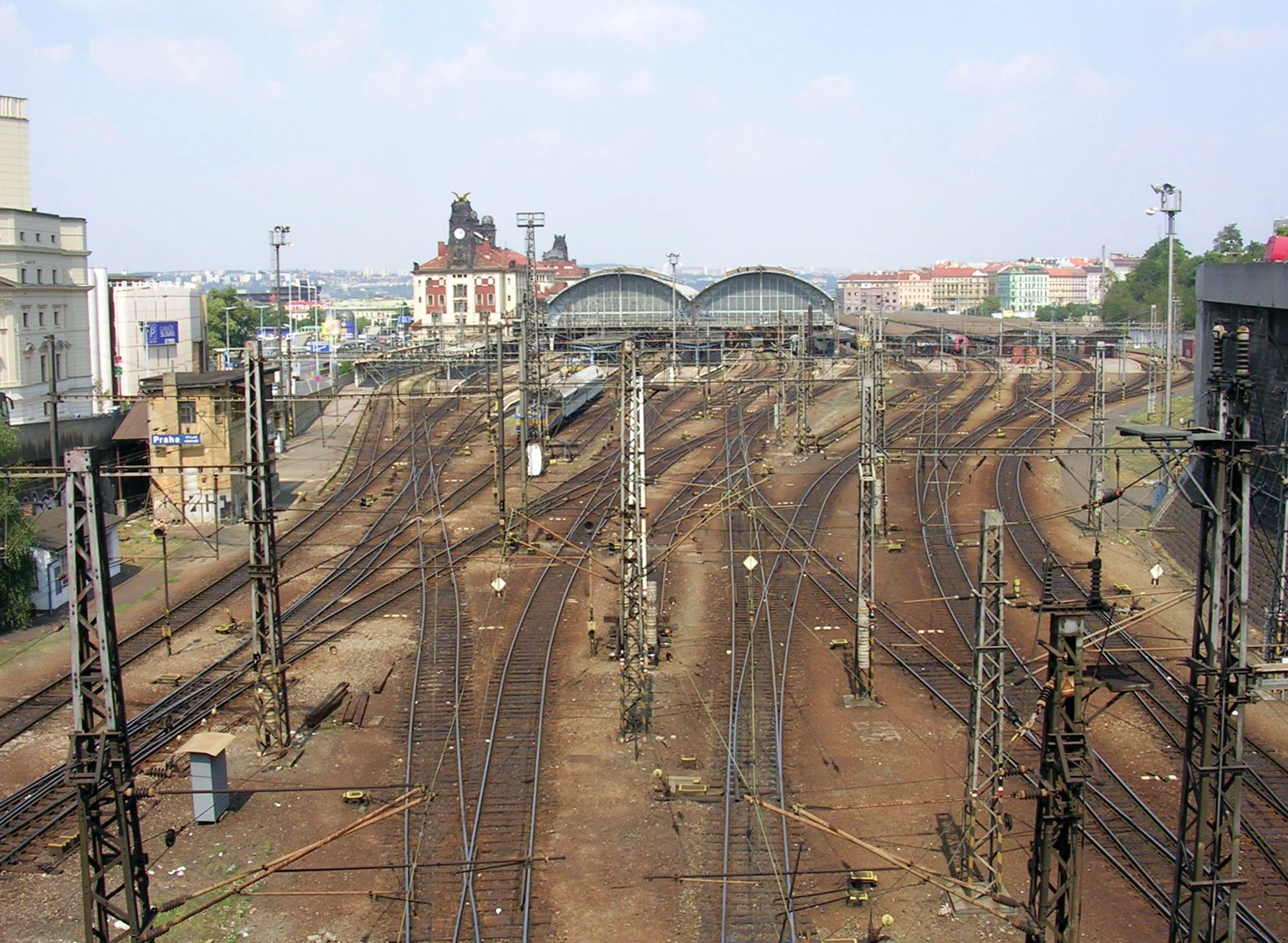 Železniční stanice Praha hlavní nádraží, pohled z jižní strany od ulice Vinohradské